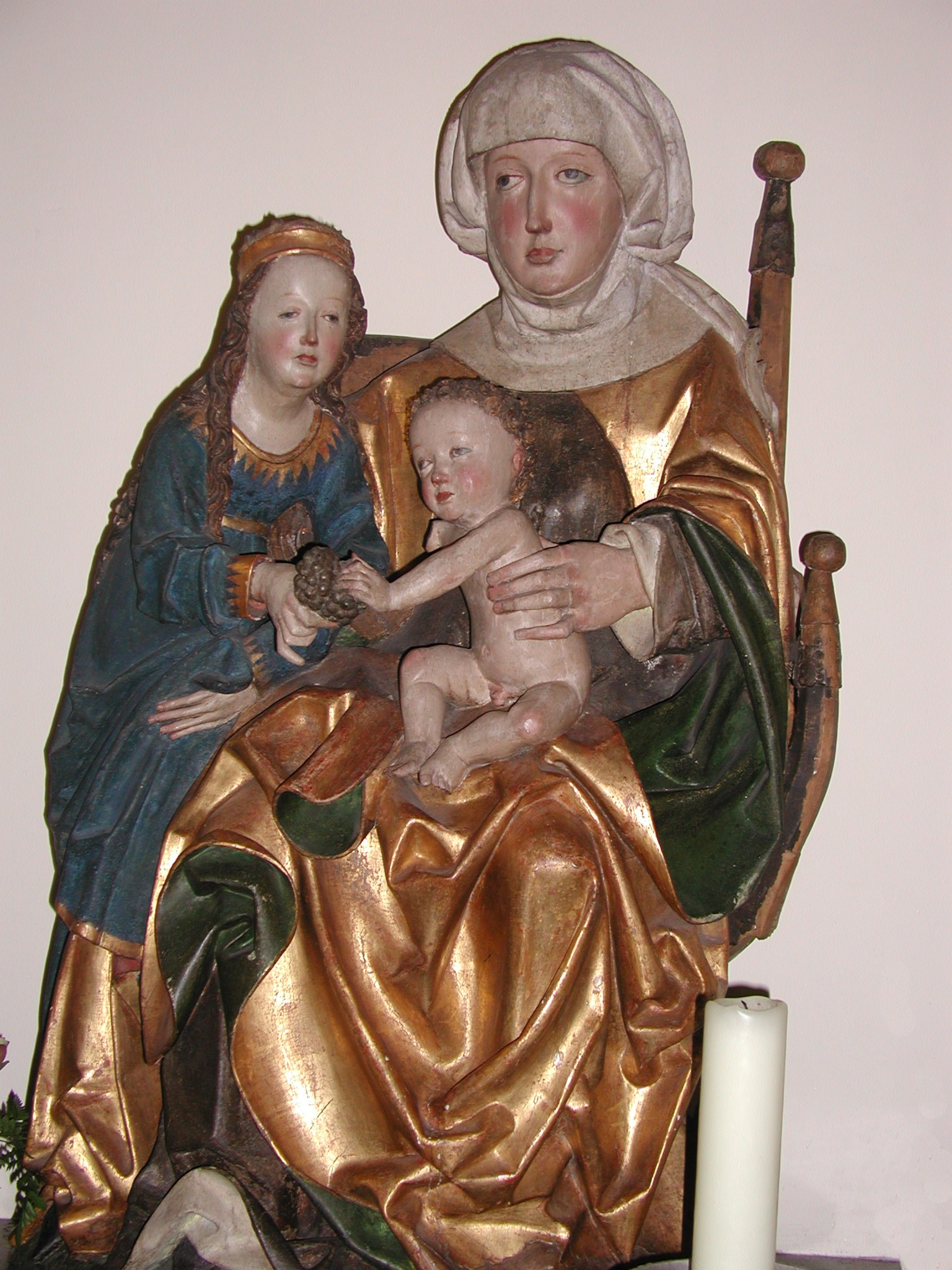 St. Marienkirche in Berlin-Karlshorst